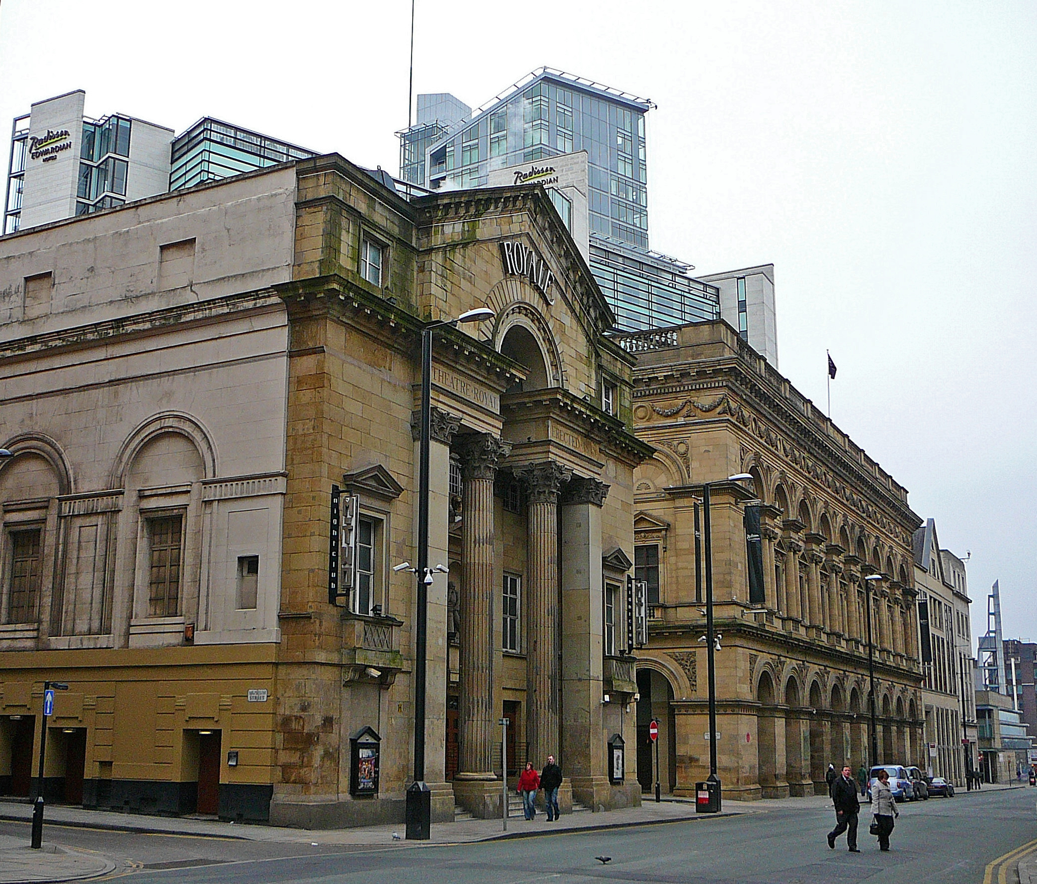 Manchester